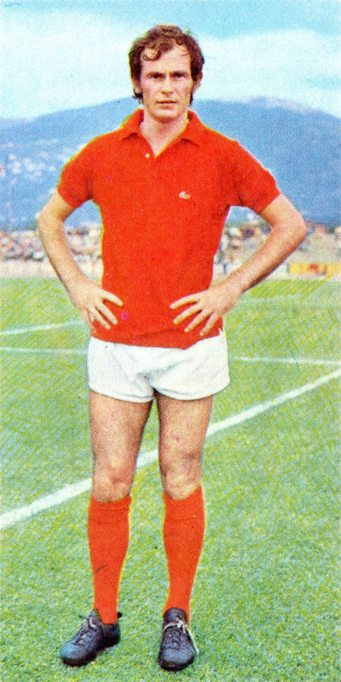 Il calciatore italiano Elvio Salvori alla Roma all'inizio della stagione 1970-71.